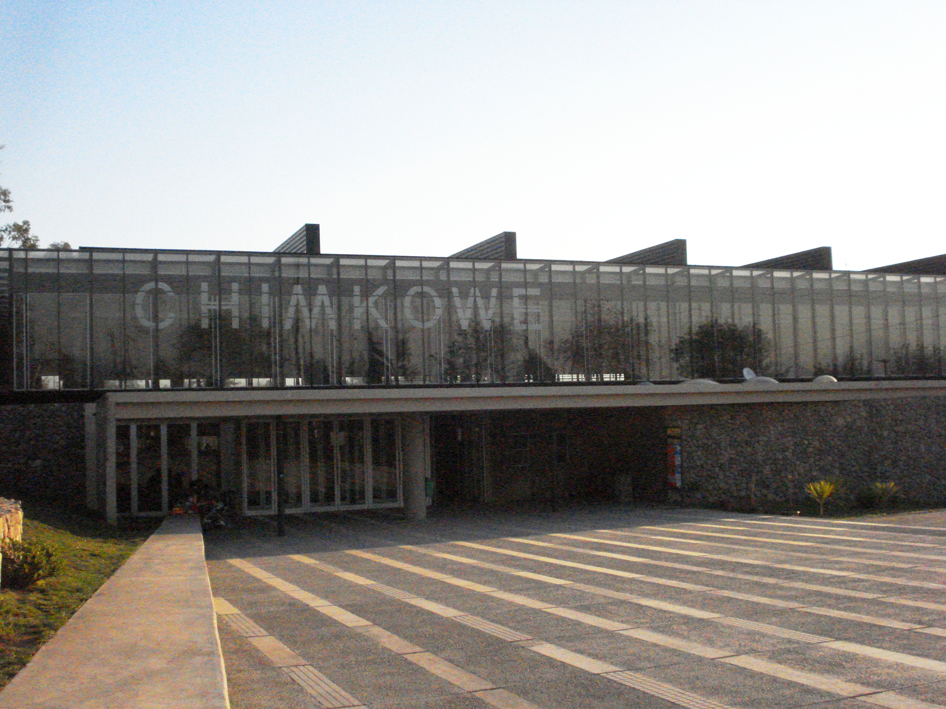 Chimkowe es un centro deportivo ubicado en la comuna de Peñalolén, en el sector oriente de Santiago de Chile.